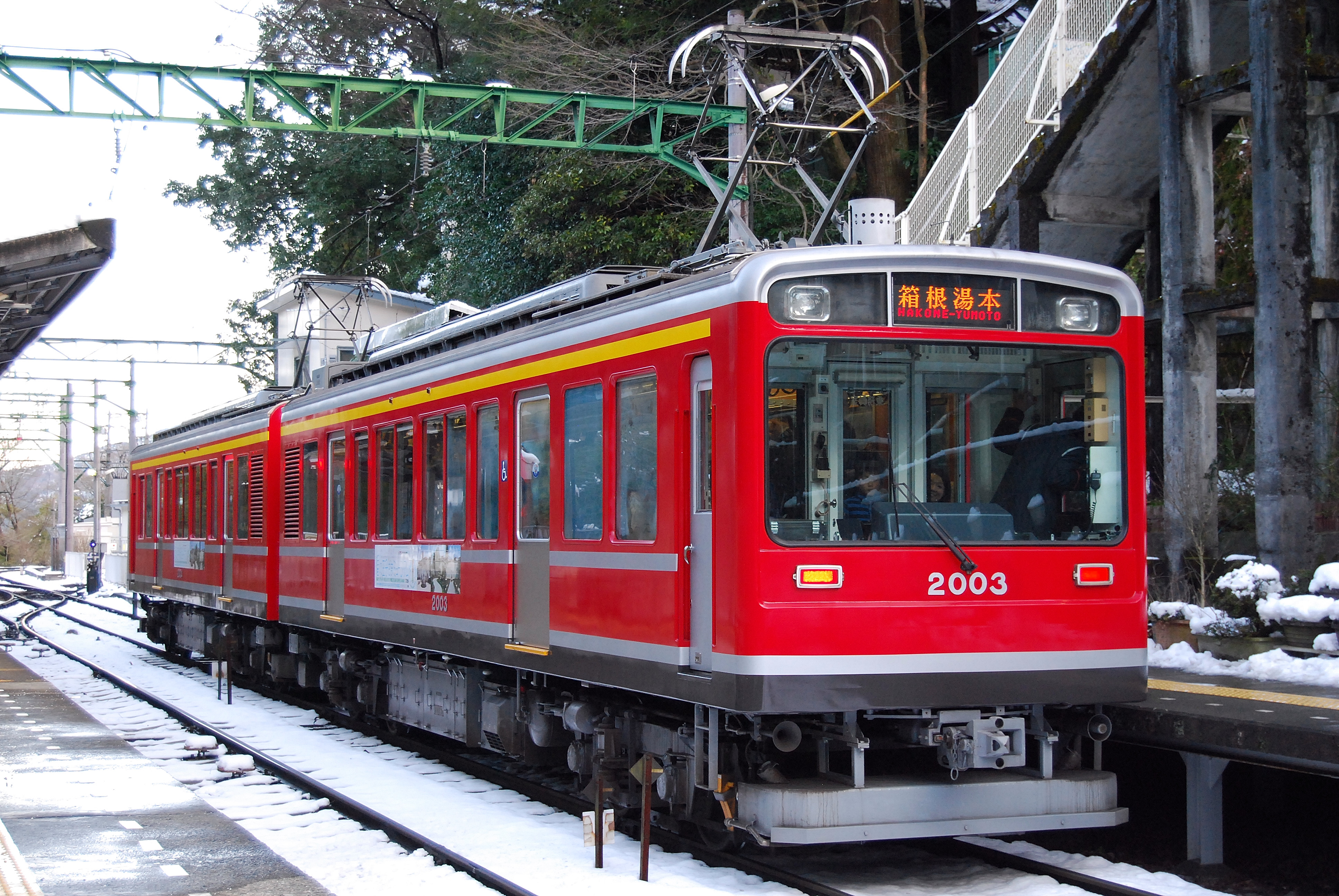 箱根登山鉄道2000系2両編成（大平台駅）